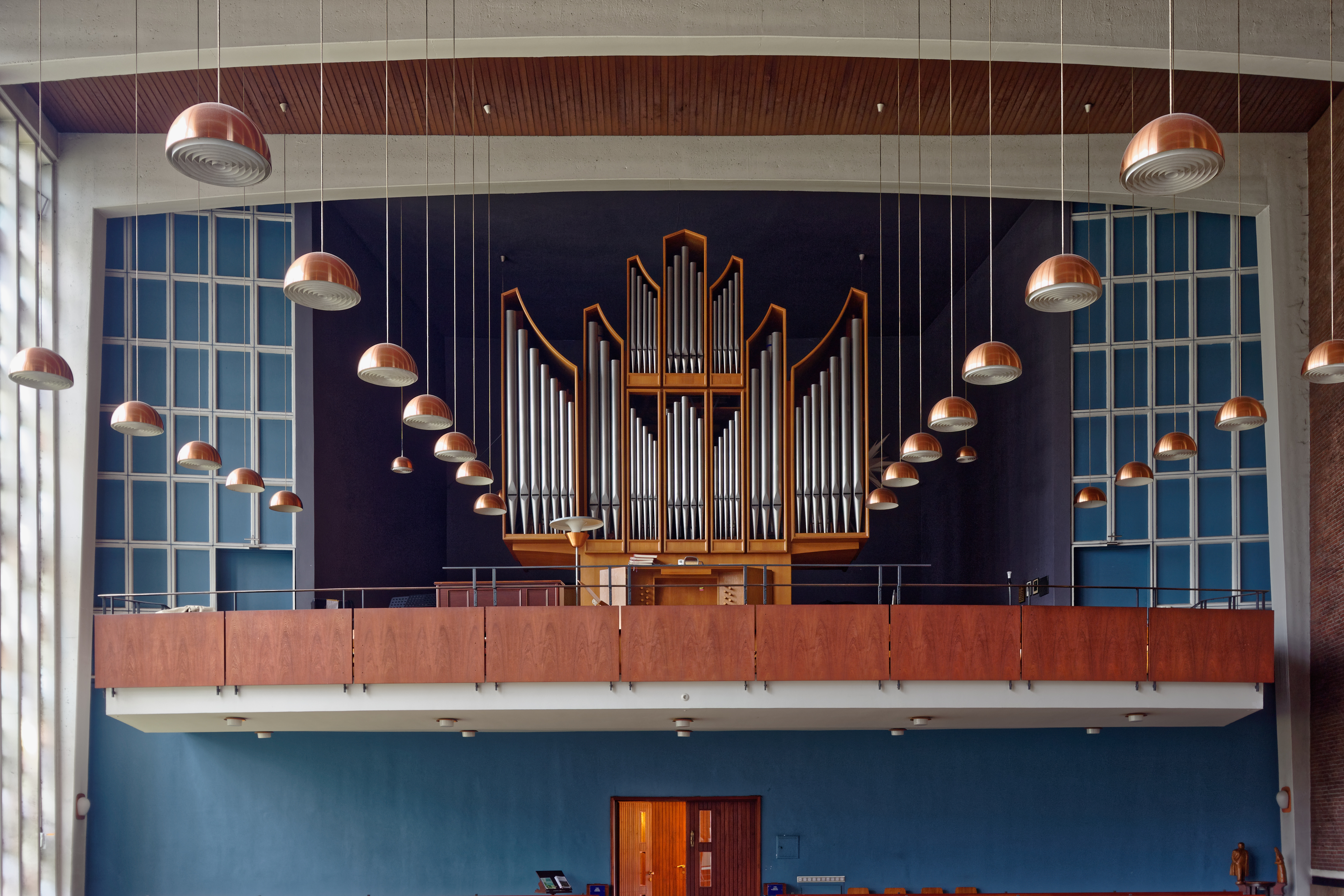 Paul-Gerhardt-Kirche, Hamburg-Winterhude, Orgel